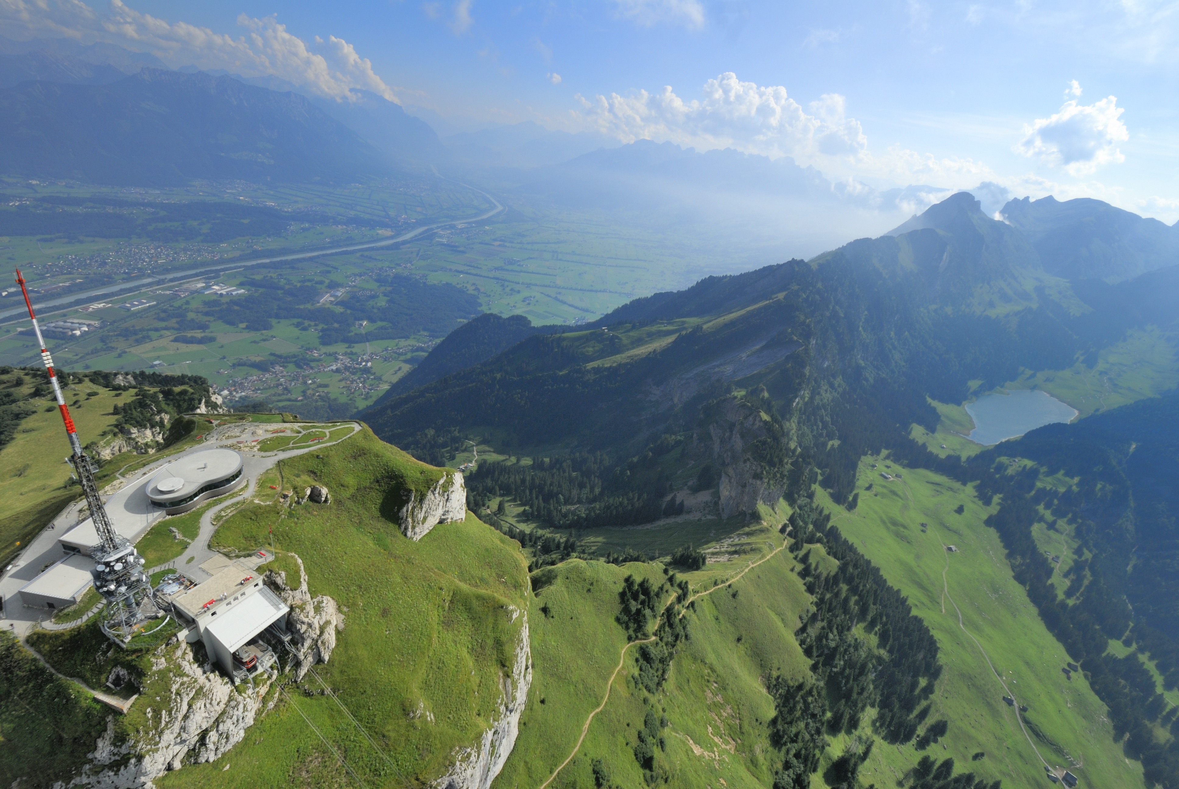 Hoher Kasten Gipfel Drehrestaurant Rheintal